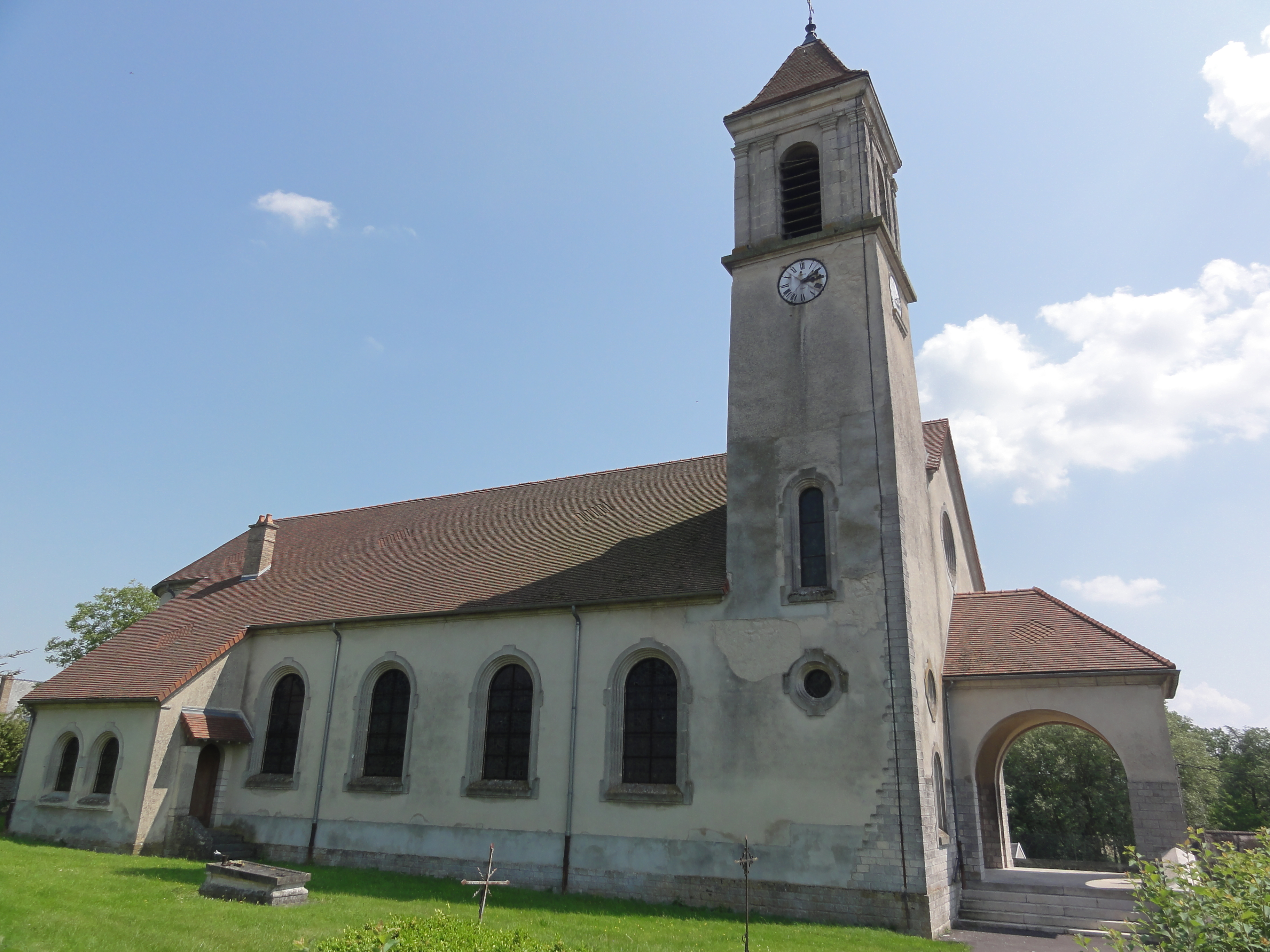 Herpy-l'Arlézienne (Ardennes) église